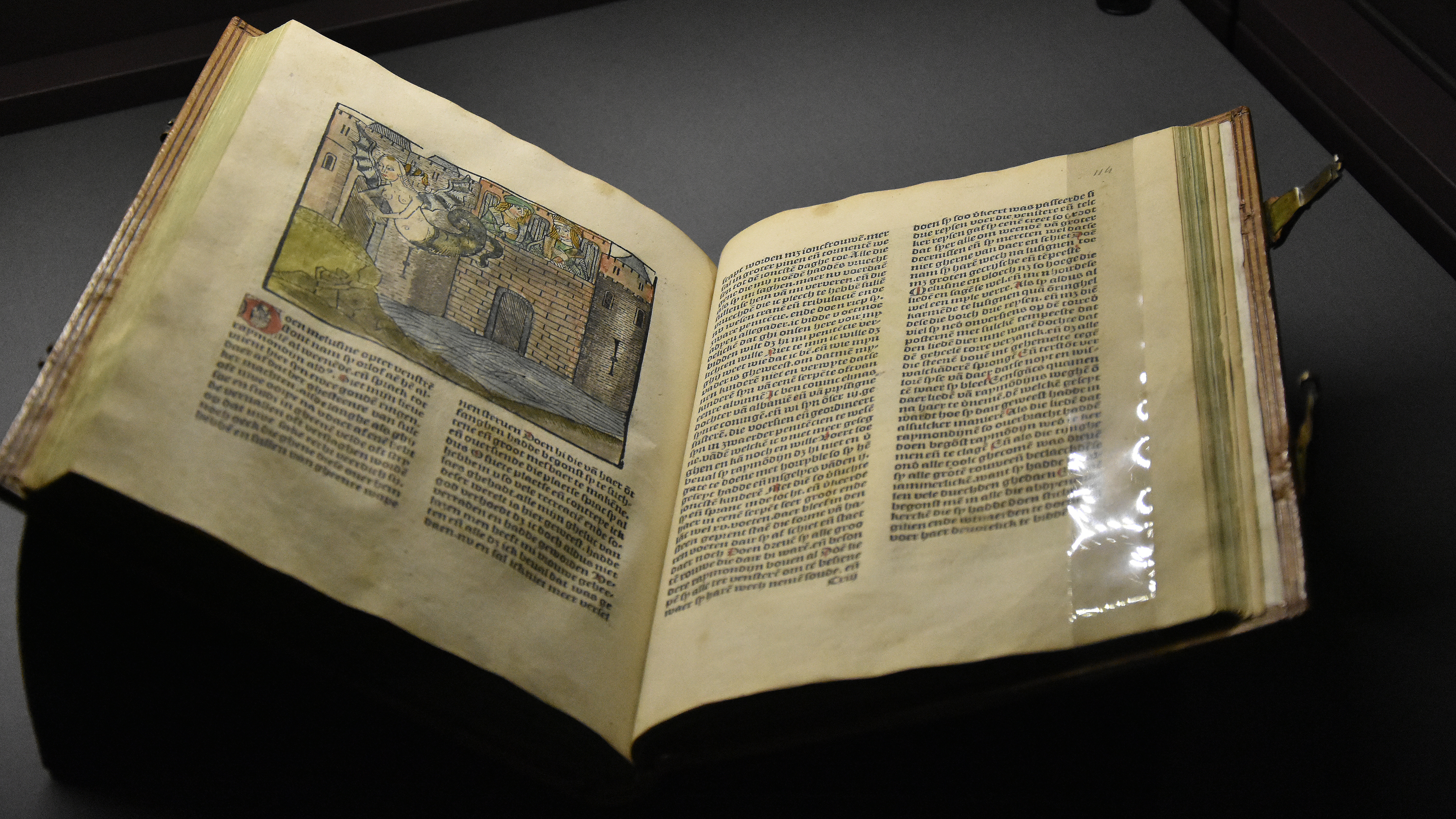 Jean d'Arras - Die wonderlike vreemde ende schone historie van Melusijnen ende van haren geslachte - dit document is een incunabel of wiegendruk - een van de eerste gedrukte boeken - gedrukt in 1491 bij Gheraert Leeu te Antwerpen This is a file created at the museum: Royal Library of Belgium in Brussels